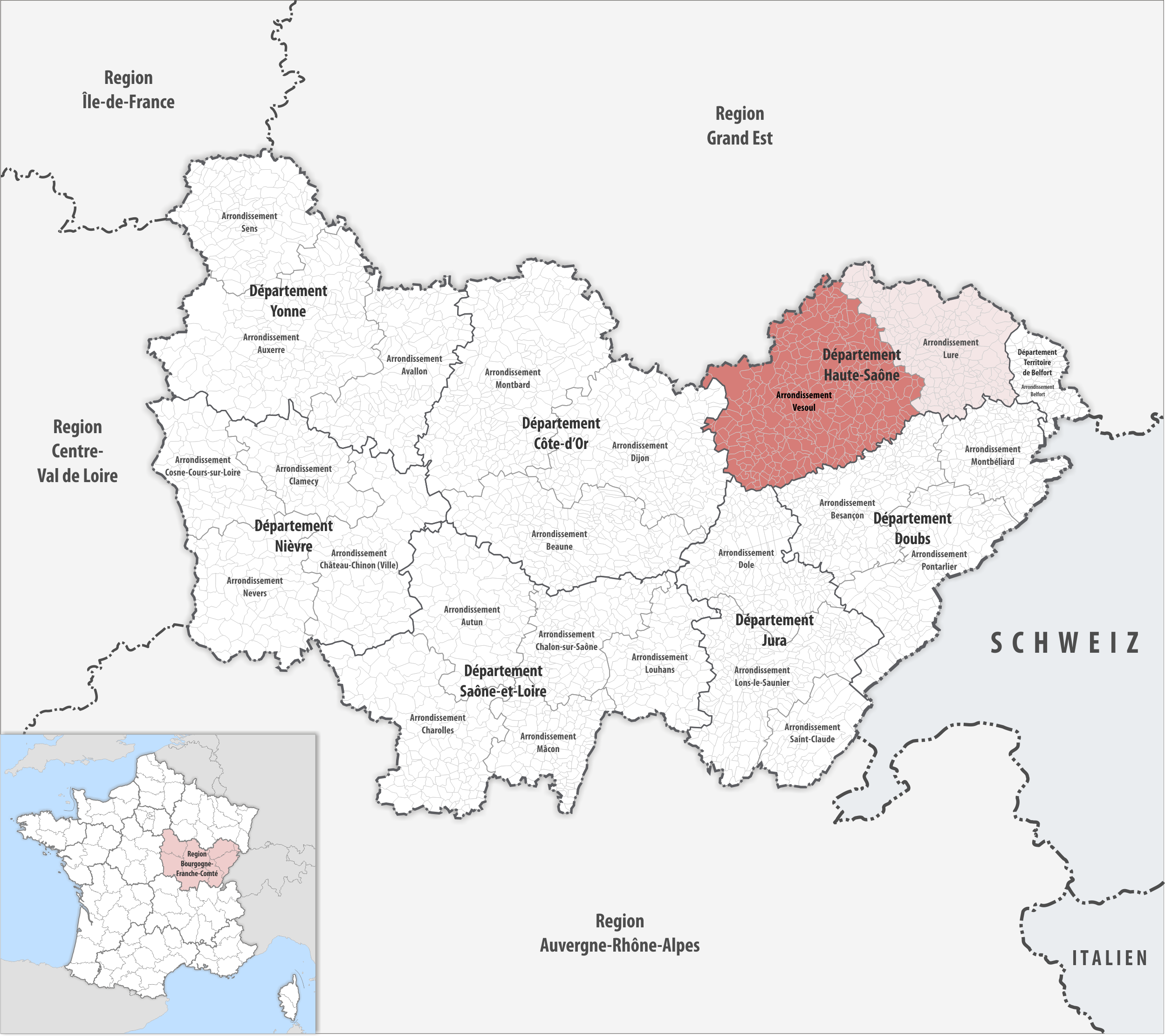 Lage des Arrondissements Vesoul